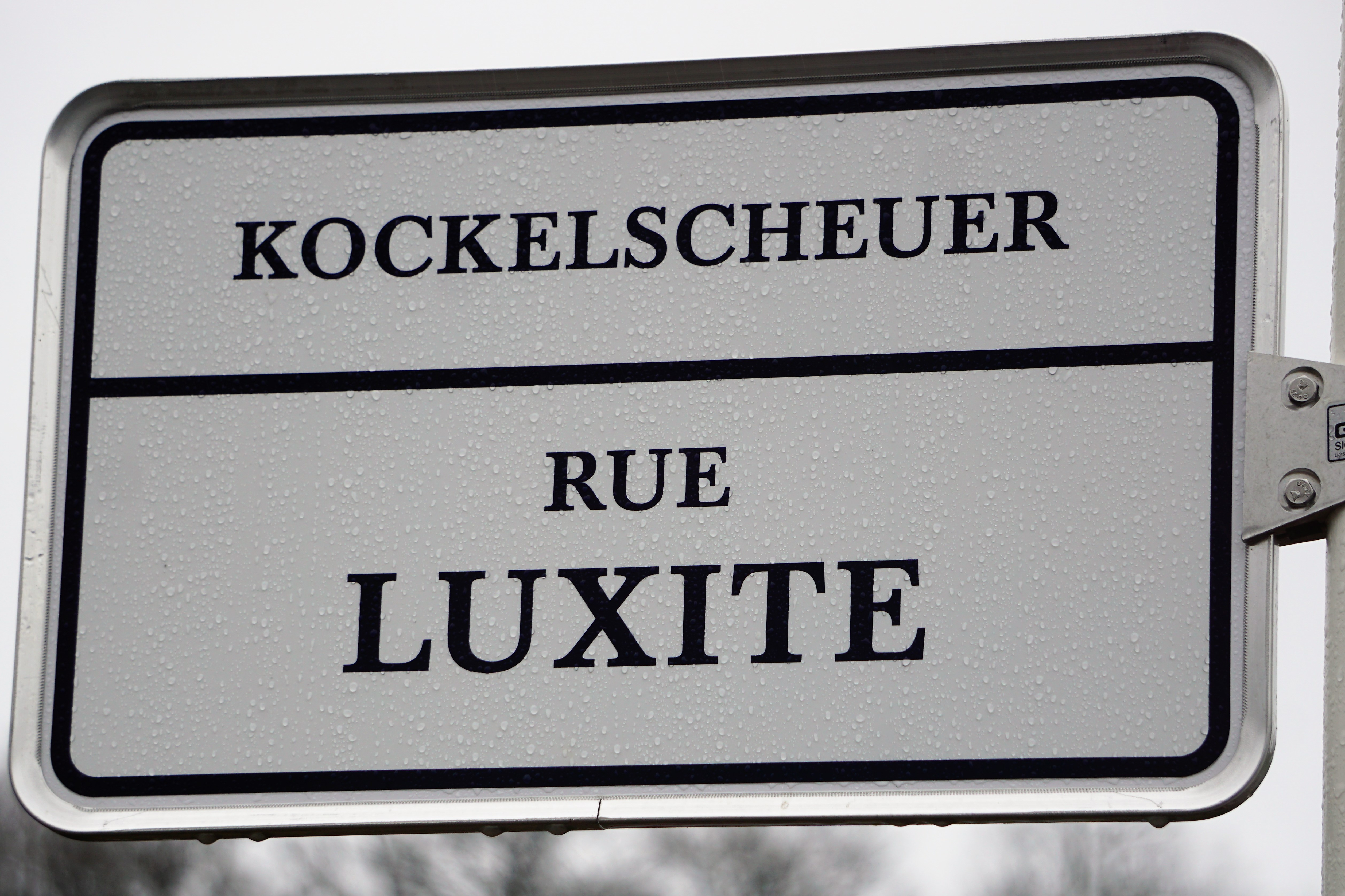 Stroosseschëld zu Diddeleng, quartier Lenkeschléi.